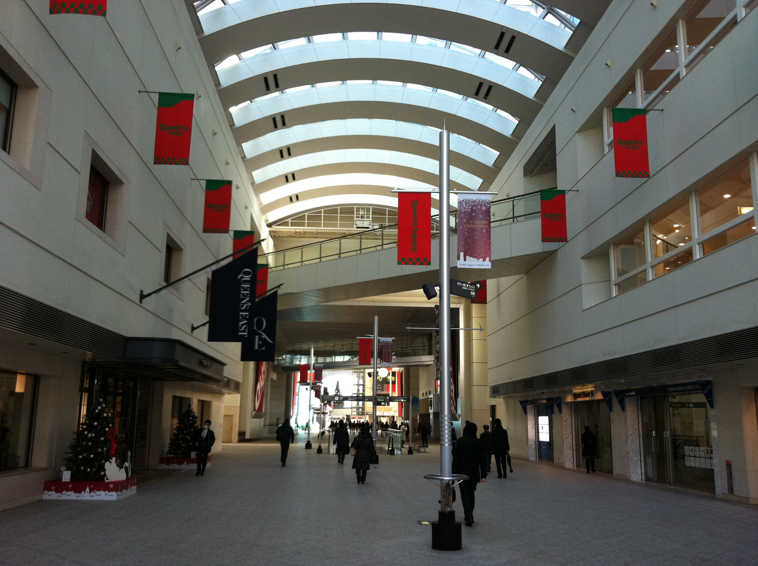 クインズスクエア2階部分のクイーンモール（クイーン軸の一部）。